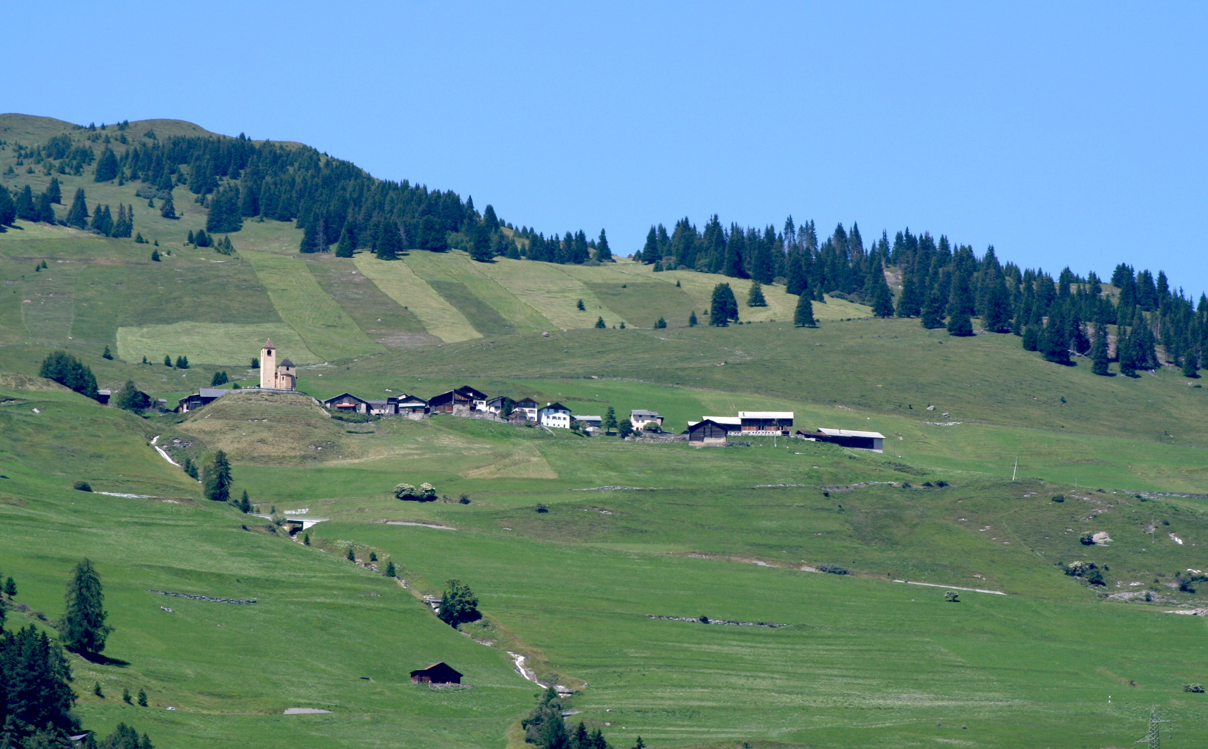 Lohn GR